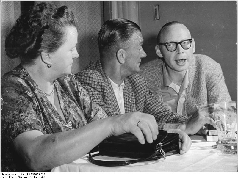 Zentralbild Krisch 8.6.1960 2. Arbeiterfestspiele des FDGB. Schauspieler des Maxim-Gorki-Theater Berlin diskutieren mit Arbeitern. Die Mitglieder des Ensembles des Berliner Maxim-Gorki-Theaters traten am 6.6.1960 mit der Komödie von MacColl "Unternehmen Ölzweig" vor dem Publikum der Bergarbeiterstadt Aue auf. Im Anschluß an die Vorstellung führten die Schauspieler eine Aussprache mit Arbeitern aus dem VEB Blechbearbeitungs-Maschinenwerk Aue und Angestellten des Kreiskrankenhauses "Ernst Scheffler" durch. UBz: Schauspieler Walter Jupé im Gespräch mit Martha Richter, Angestellte im Schwesternkasino und Ernst Richter, Schlosser im Krankenhaus.